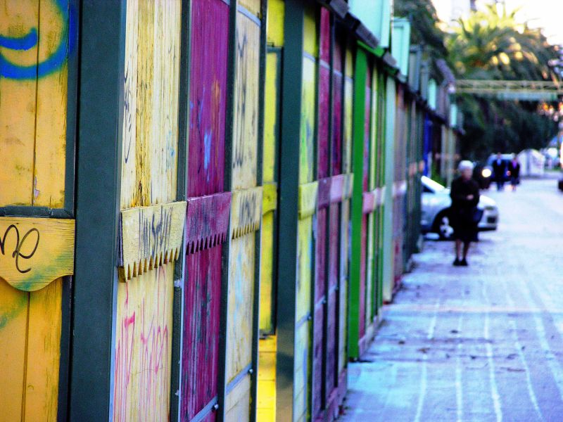 El Mercado de Testaccio. Mercado que inspiró a la canción del mismo nombre del grupo chileno folclórico Inti-Illimani